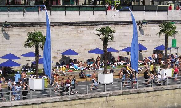 Paris-Plage 2004 vu depuis le pont au Change